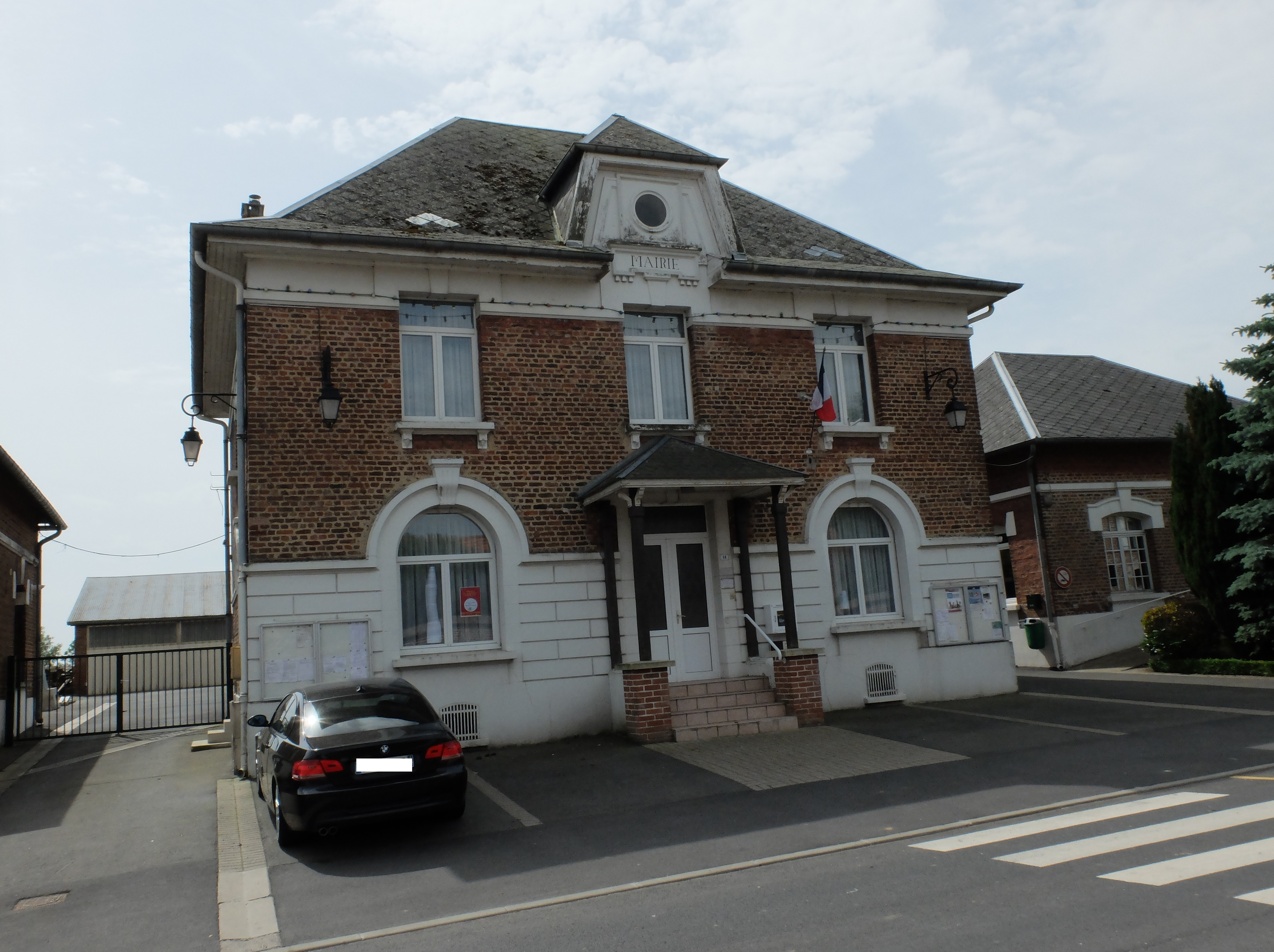 Vue de la mairie de Neuville-Vitasse.